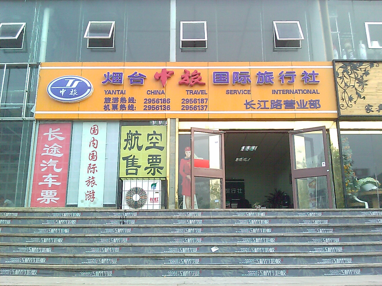 烟台中旅国际旅行社